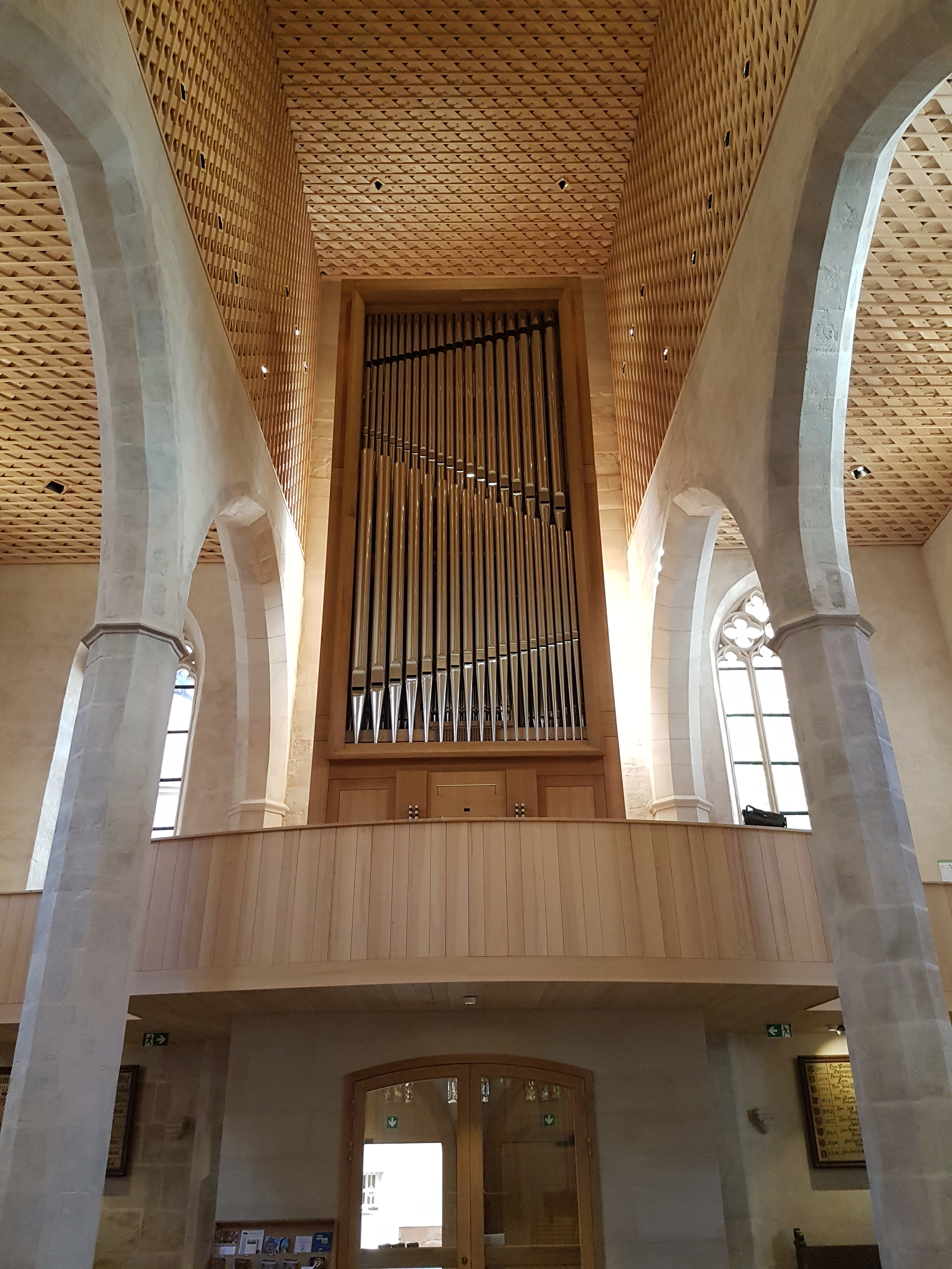 Neue Orgel von St. Martha in Nürnberg von Jügen Lutz